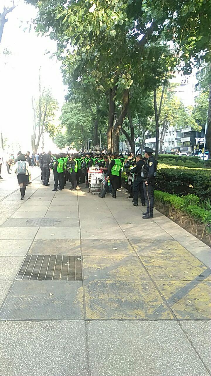 Marcha feminista contra la violencia de genero, Ni una menos. 25 de noviembre de 2019, CDMX Policía ciudadana para contener a las manifestantes.